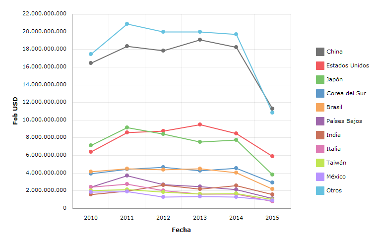 Exportaciones de Chile del periodo 2010-hasta septiembre 2015 expresadas en USD valor FOB.